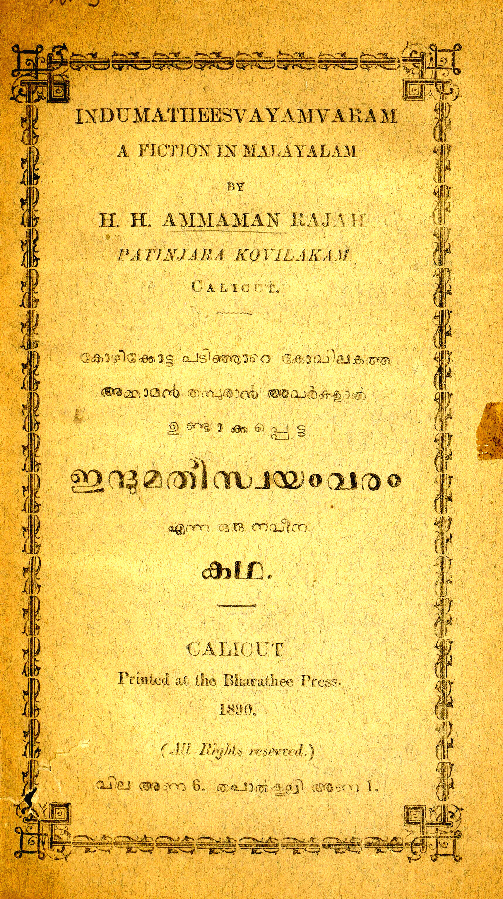 കോഴിക്കോട്ട പടിഞ്ഞാറെ കോവിലകത്തെ അമ്മാമൻ തമ്പുരാൻ അവർകളാൽ ഉണ്ടാക്കപ്പെട്ട ഇന്ദുമതീസ്വയംവരം എന്ന ഒരു നവീന കഥ.